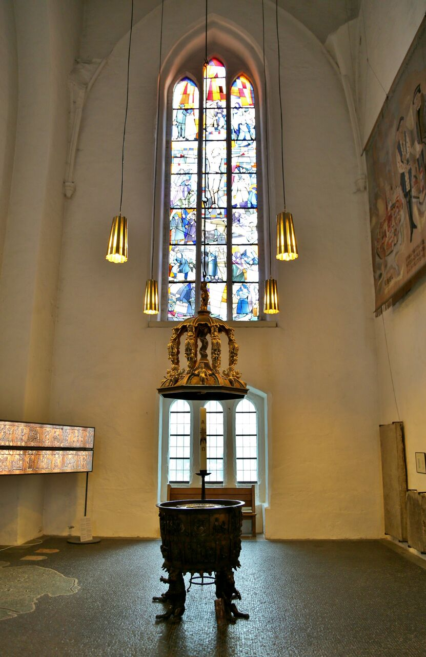 Pommernkapelle in der Kieler Nikolaikirche.